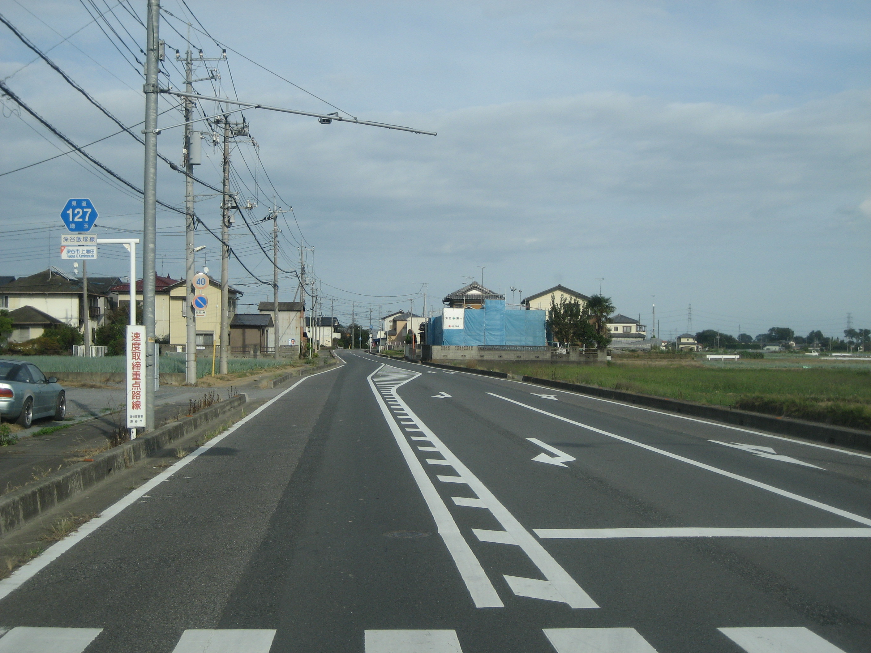 埼玉県道127号線深谷市内